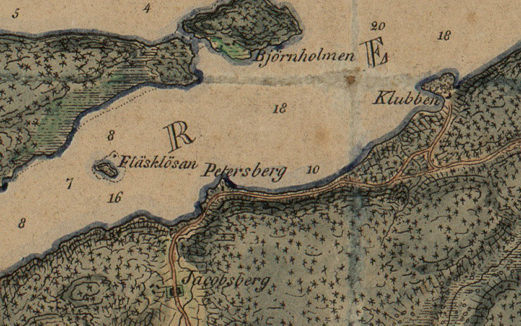 Pettersberg på 1817 års karta över Stockholm med omgivningar